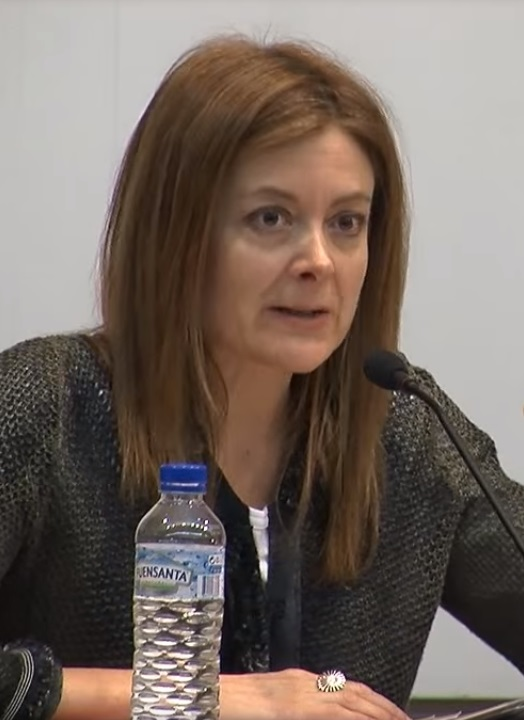 Pepa Fernández.